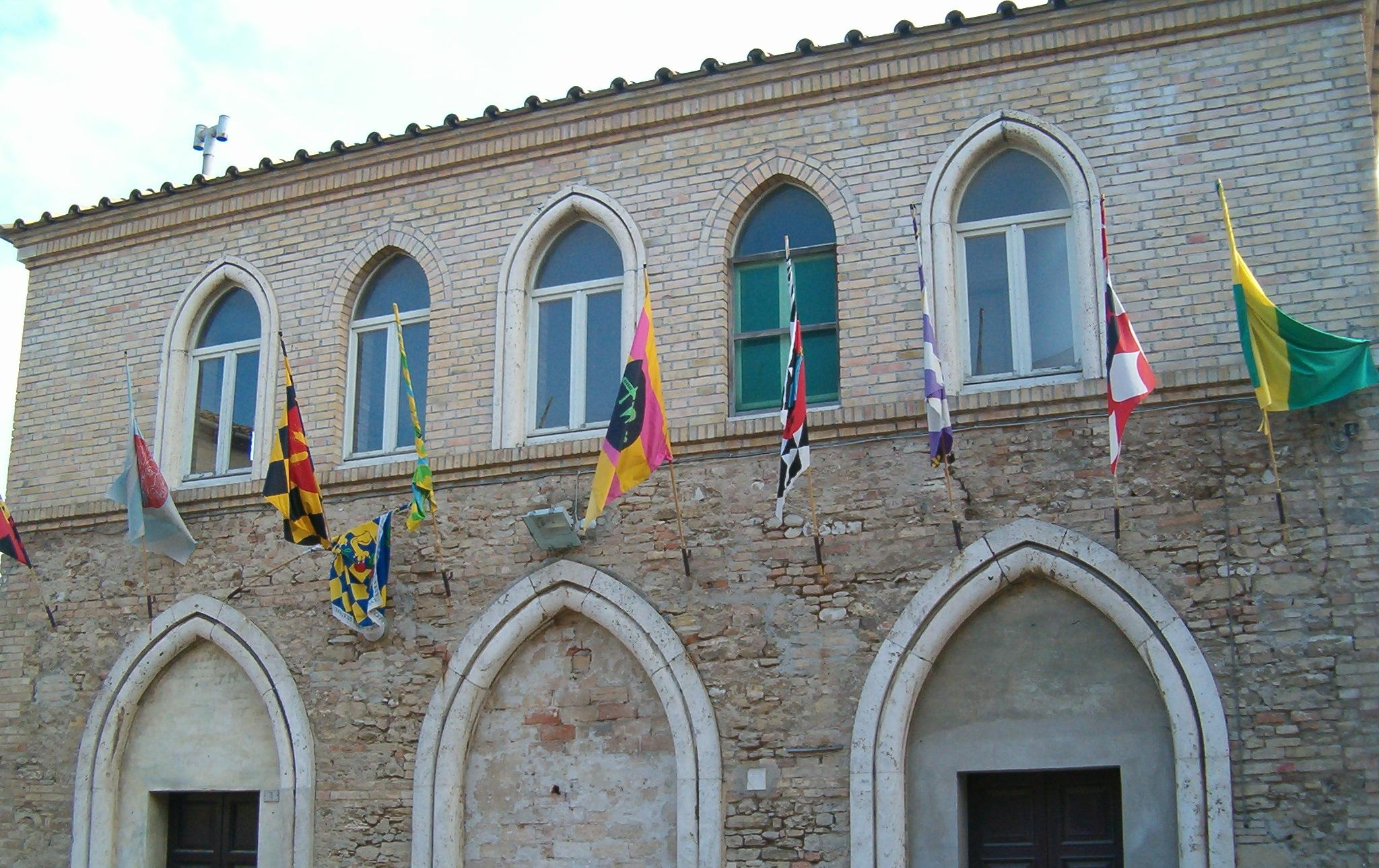 Le Bandiere delle contrade di Fermo esposte a Torre di Palme frazione della città marchigiana.